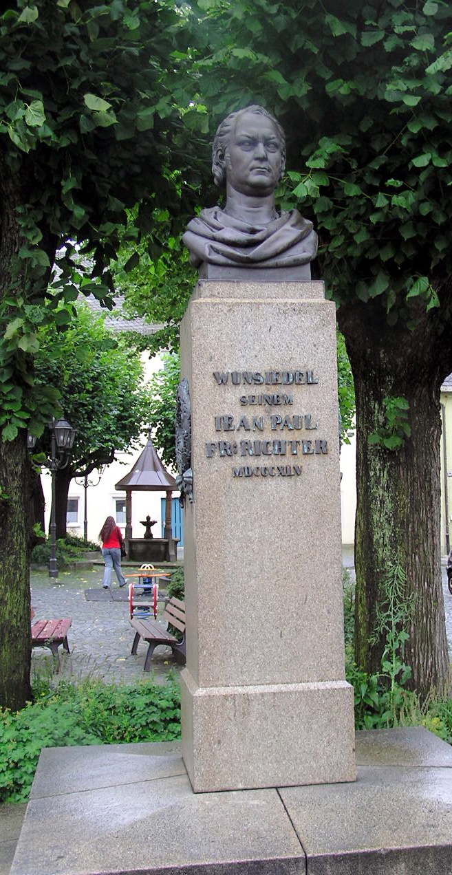 Description: Jean Paul-Denkmal von Ludwig Schwanthaler in Wunsiedel Inschrift: WUNSIEDEL SEINEM JEAN PAUL FR[iedrich] RICHTER MDCCCXLV [1845] Source: selbst fotografiert Date: 5. April 2005 Author: Schubbay